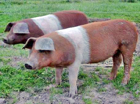 Husmer Protestfierkelen.